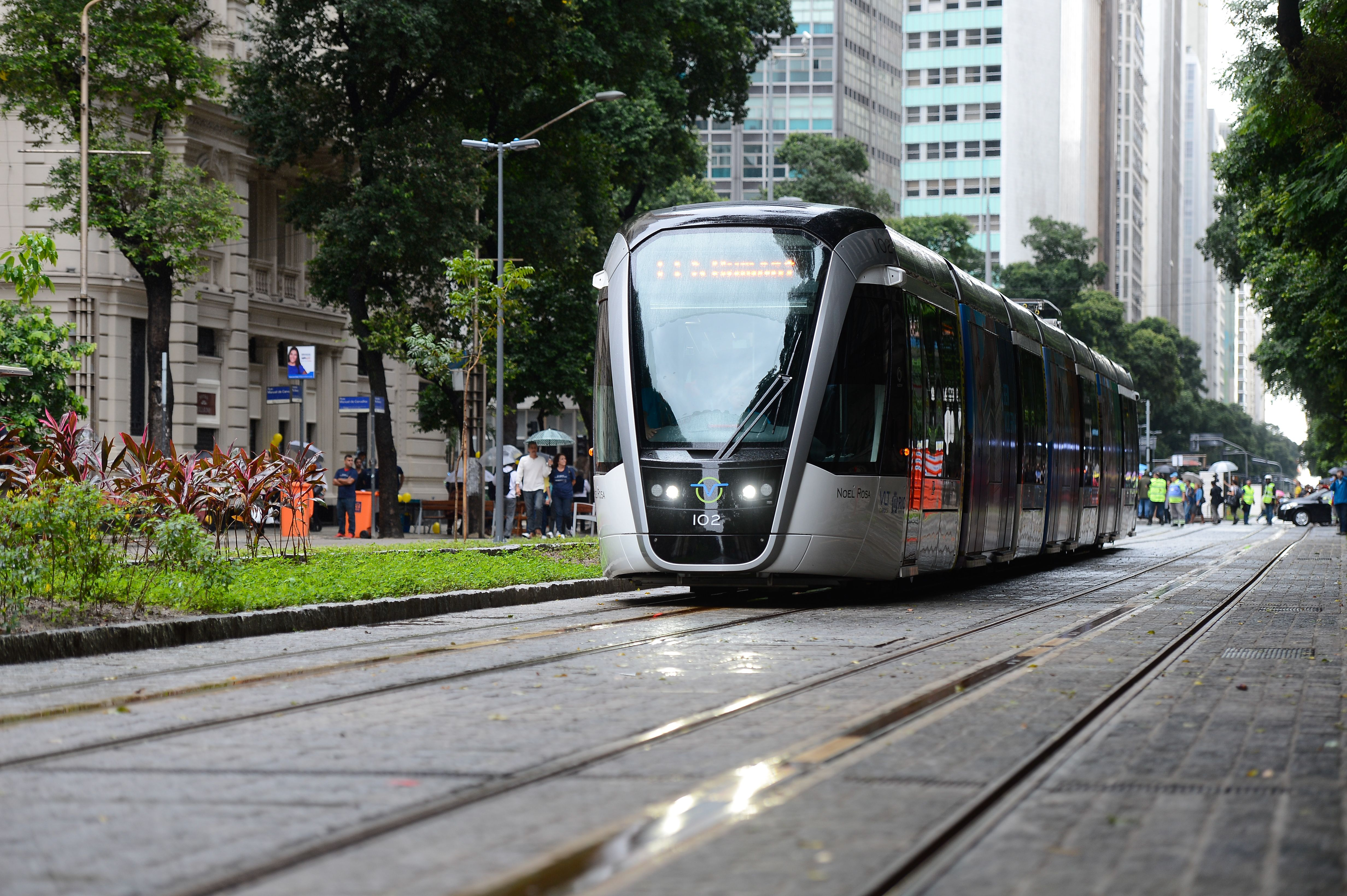 Rio de Janeiro - Viagem inaugural do Veículo Leve sobre Trilhos (VLT) Carioca, no centro da cidade.